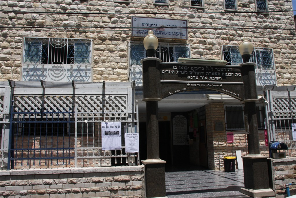 מראה מבחוץ